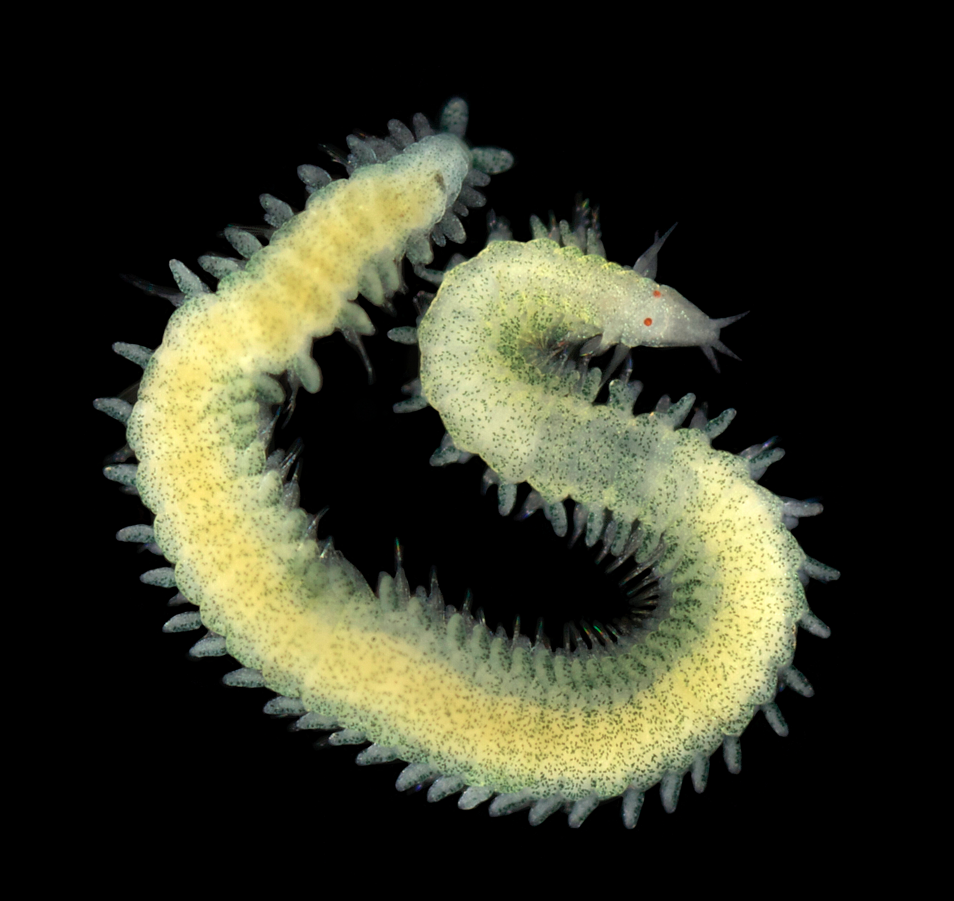 Pseudomystides spinachia